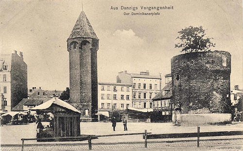 Plac Dominikański w Gdańsku: po lewej wieża Jacek, po prawej Baszta Dominikańska.